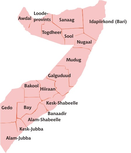 Somaalia piirkonnad